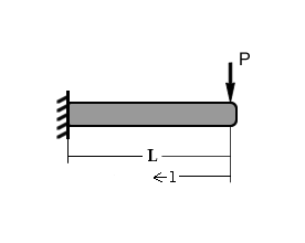 Viga empotrada con carga concentrada en extremo.